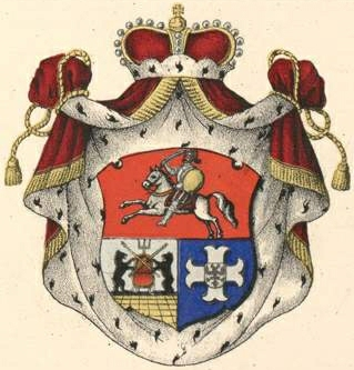 Golitsõni suguvõsa vürstivapp